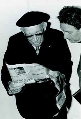 Foto di Joseph Kampé de Fériet